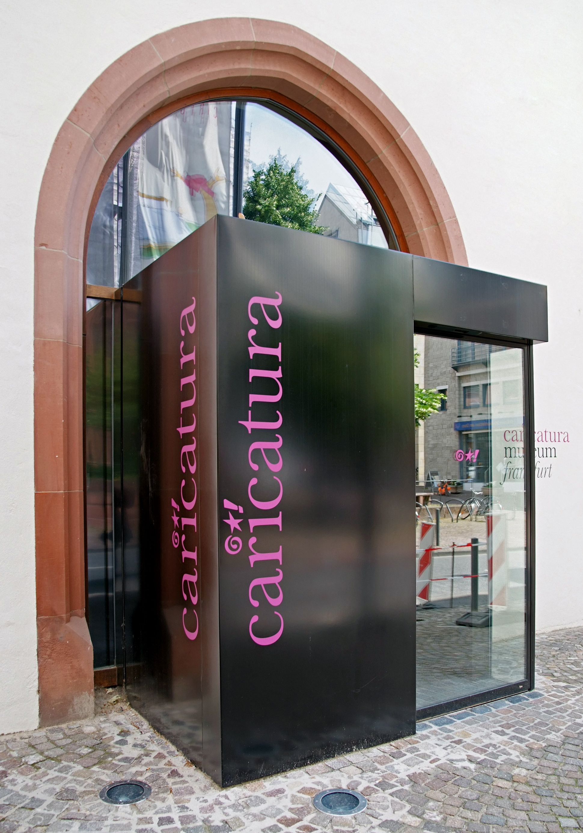 Einagng zum Museum für Komische Kunst, Caricatura, im Leinwandhaus Frankfurt